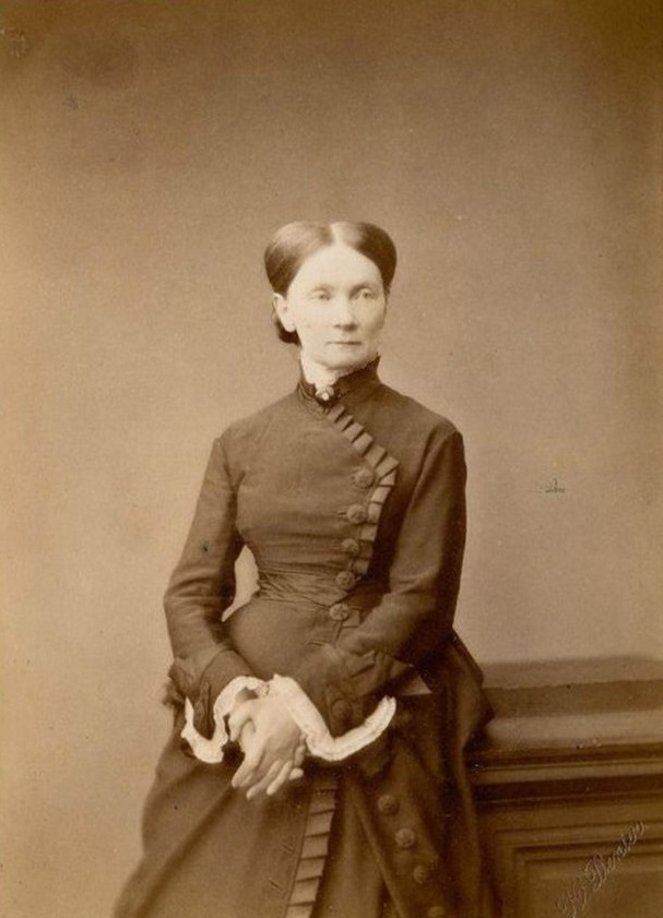 Баронесса Эдита Фёдоровна Раден (1823—1885)